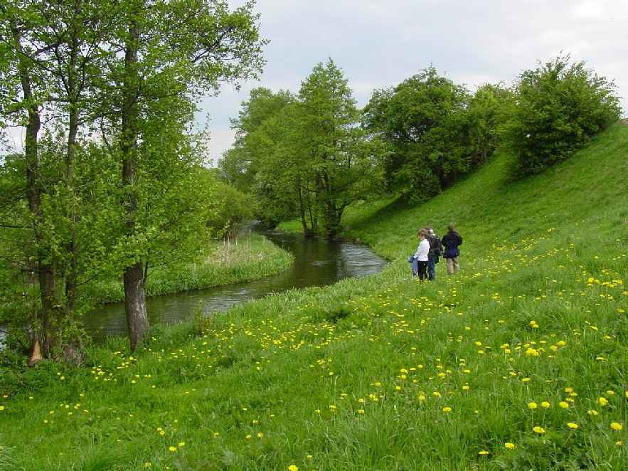 Rzeka Wierzyca w okolicach Zamku Kiszewskiego. Wiosna 2004. Autor fot. Stanisław Kosiedowski.